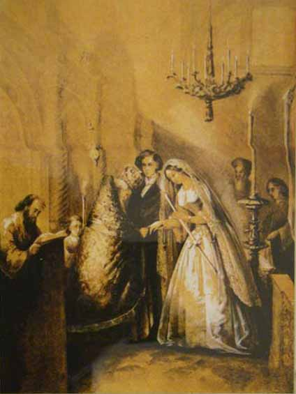 Венчание М. А. Бек (Столыпиной ) с П. П. Вяземским, 17 октября 1848 год.